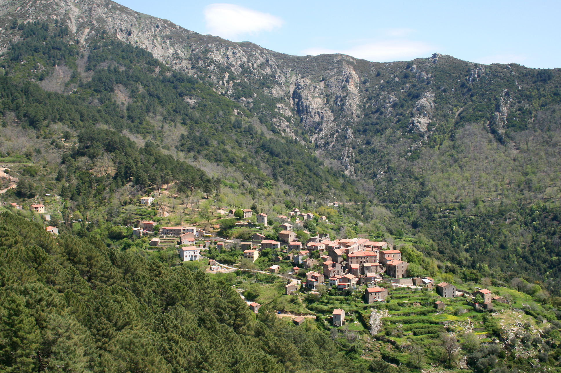 Rosazia France (Corse du Sud), le village dans son cirque de montagnes.